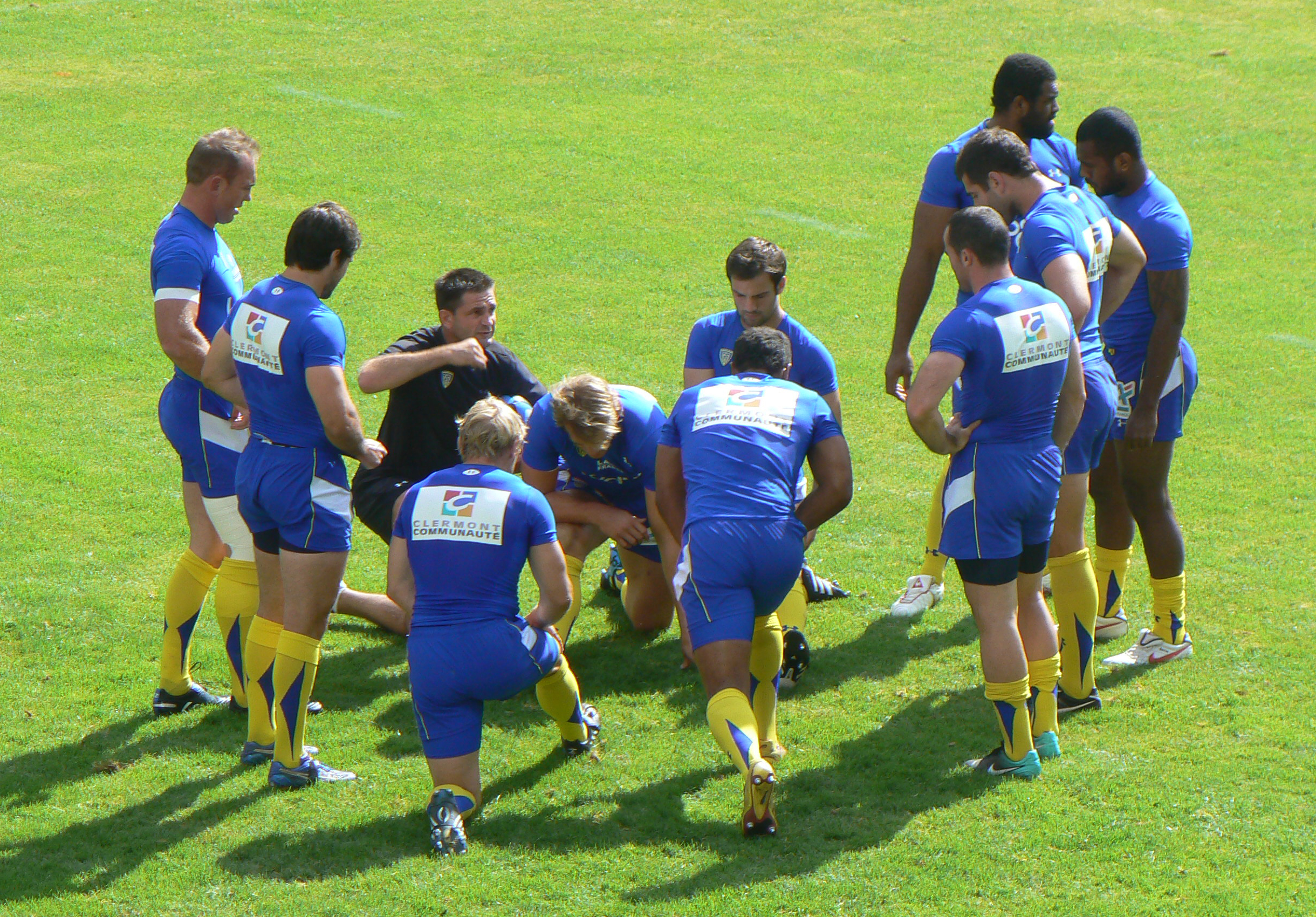 Les joueurs de l'ASM Clermont Auvergne, champion de France en titre s'échauffent avant de disputer leur premier match à domicile au stade Marcel-Michelin de Clermont-Ferrand contre le CA Brive. Dans le sens des aiguilles d'une montre depuis l'entraîneur adjoint Franck Azéma (en noir) : Aurélien Rougerie, Morgan Parra, Napolioni Nalaga, Kini Murimurivalu, Julien Malzieu, Benoît Baby, Wesley Fofana, Brent Russell, Brock James et Marius Joubert